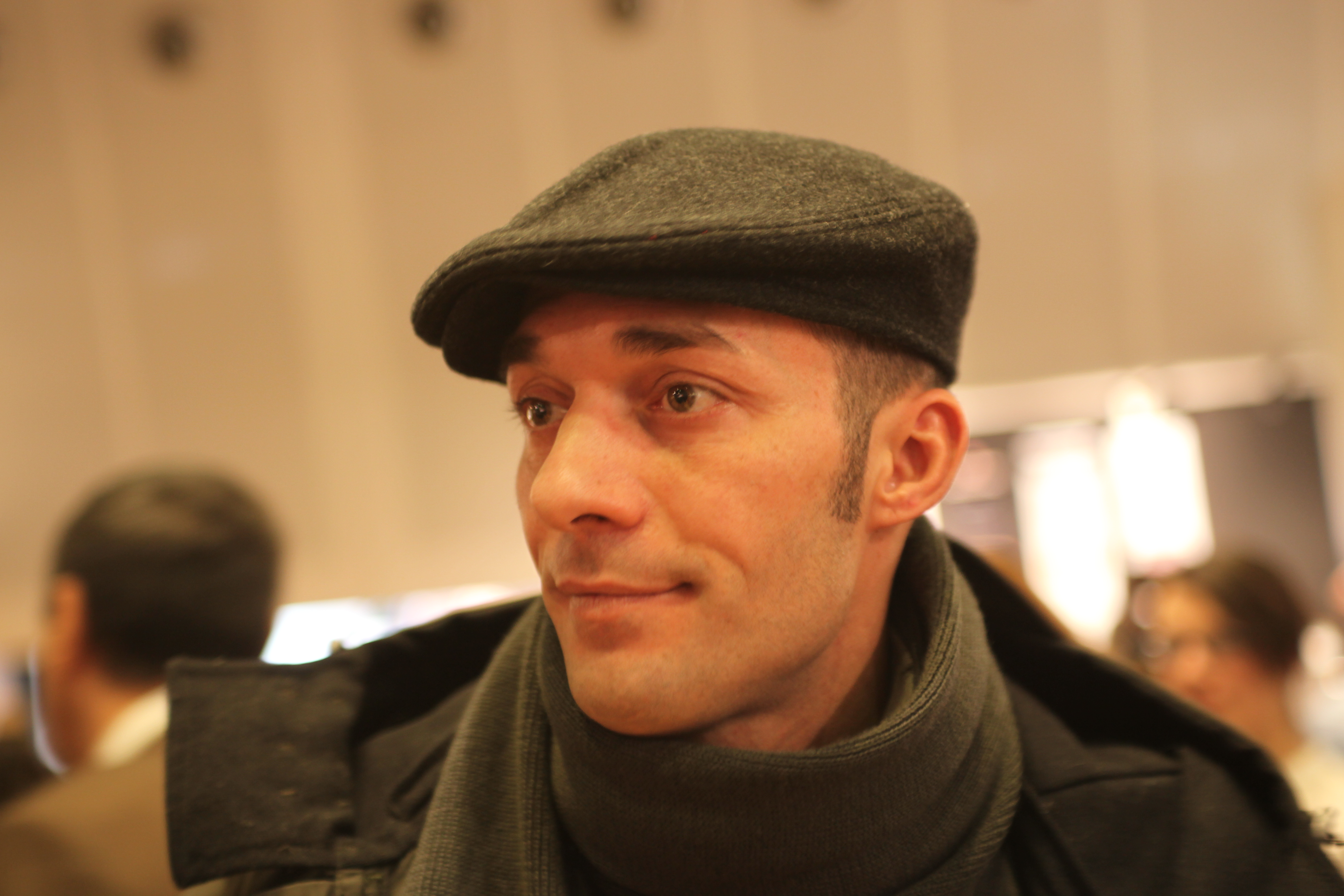 Max Laudadio